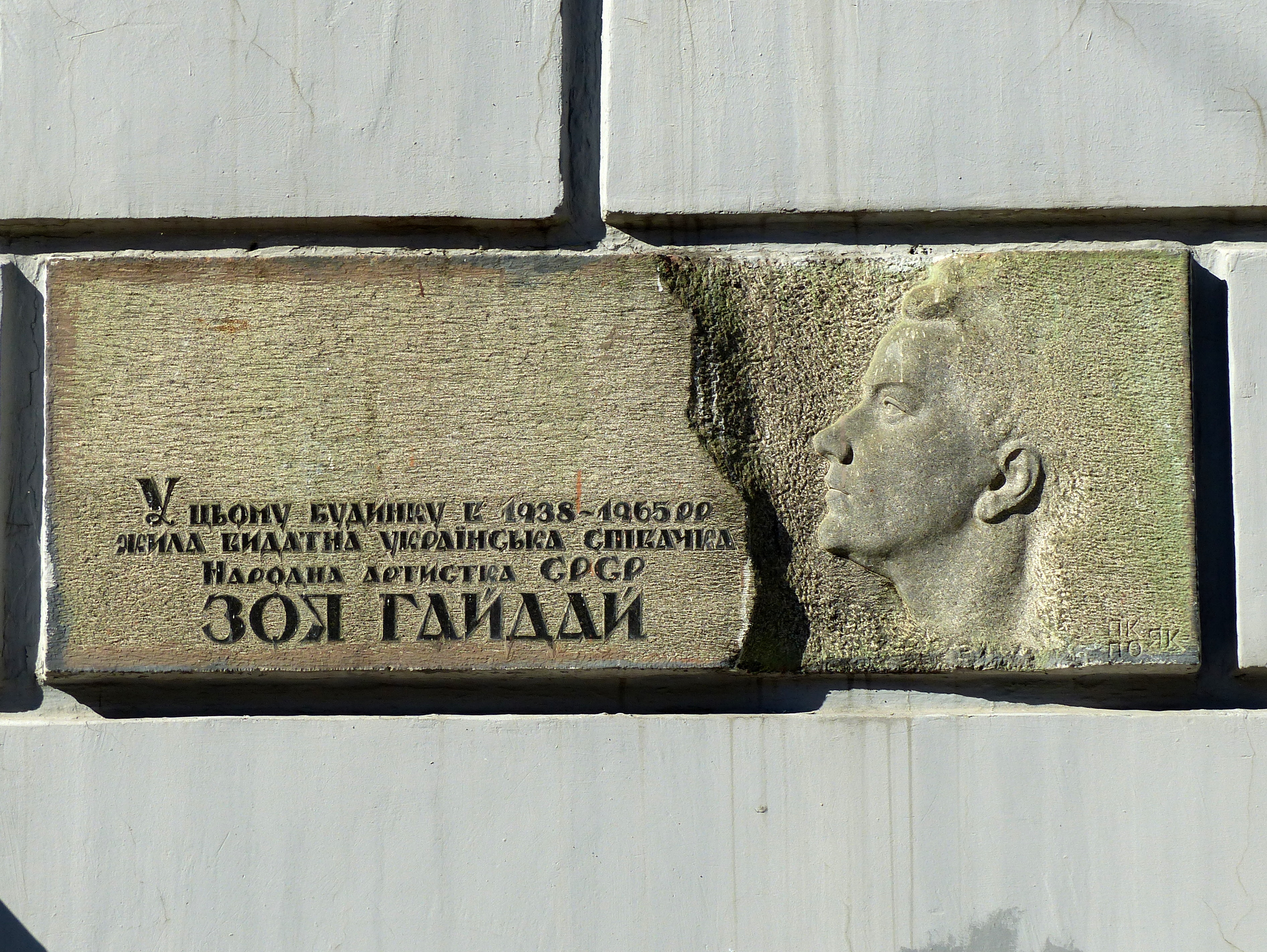 Будинок житловий артистів оперного театру, в якому мешкали видатні діячі сцени: у 1938–1965 рр. — З. М. Гайдай, у 1938–1966 рр. — М. І. Литвиненко-Вольгемут, у 1938–1947 рр. — М. В. Смолич, Київ, Пушкінська вул., 20-а